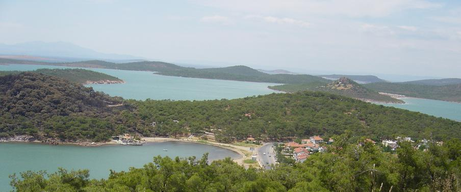 Kendi çektiğim bir fotoğraf.